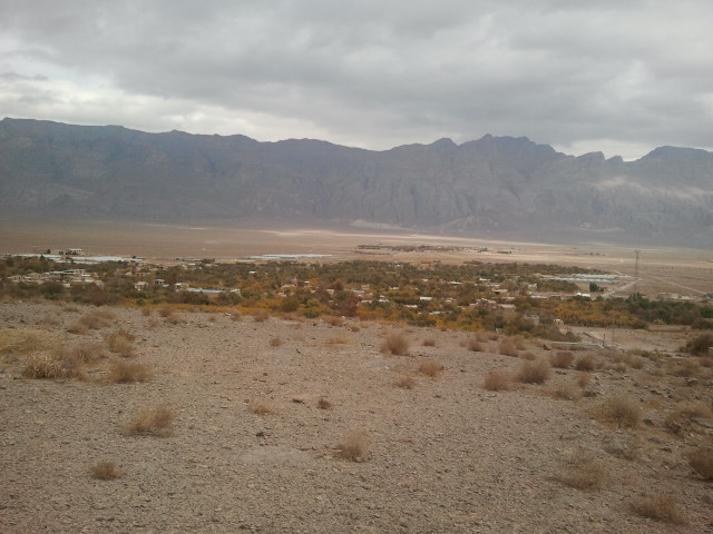 روستای ثانی اباد از بالای کوه در بخش میانکوه